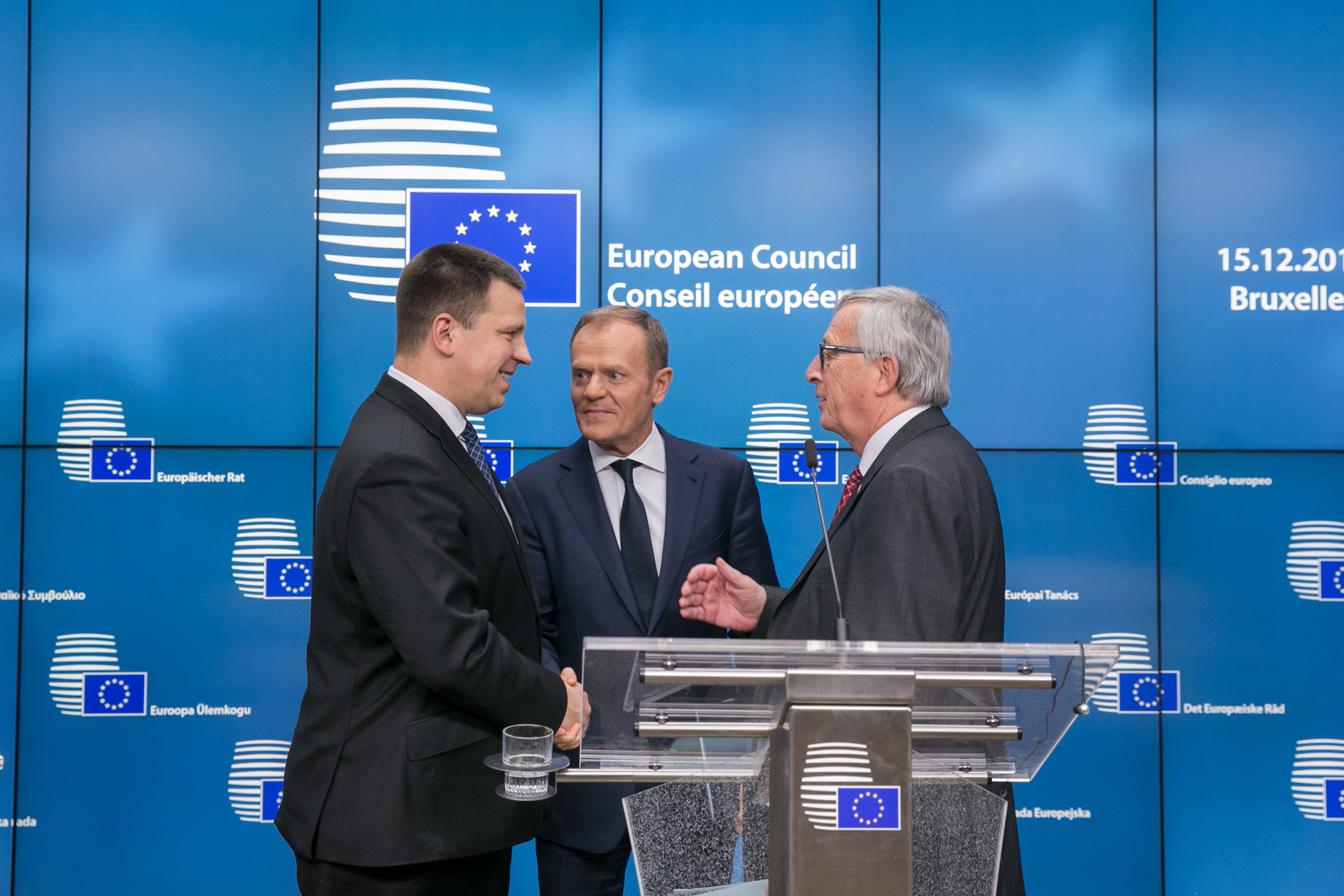 Photo: Tauno Tõhk (EU2017EE)